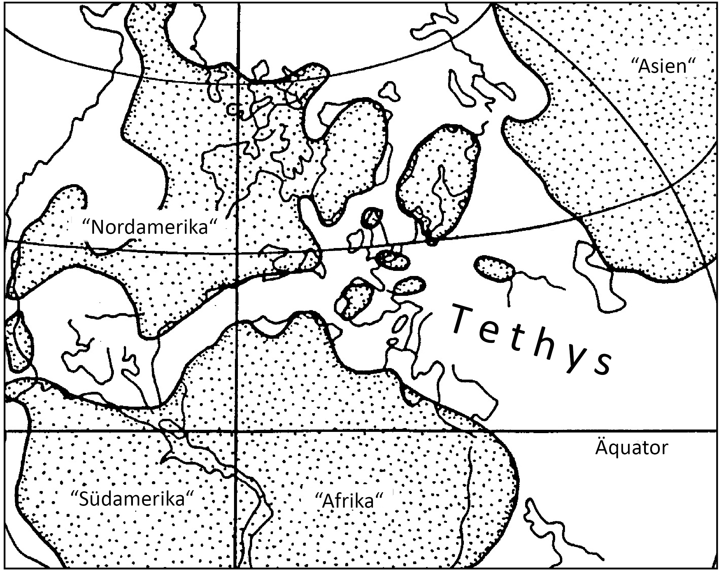 Verteilung von Festland und Meer im Atlantik- und westlichen Tethystraum im Oberjura vor ca. 150 Mill. Jahren